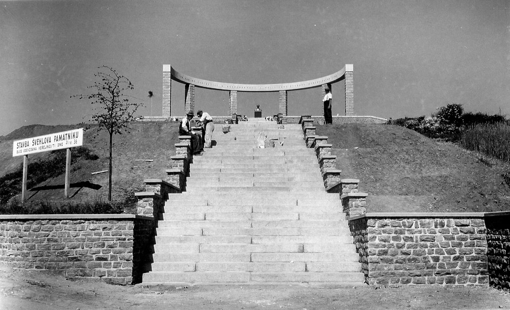 Švehlův pomník, památník obětem 2. sv. války, 1936